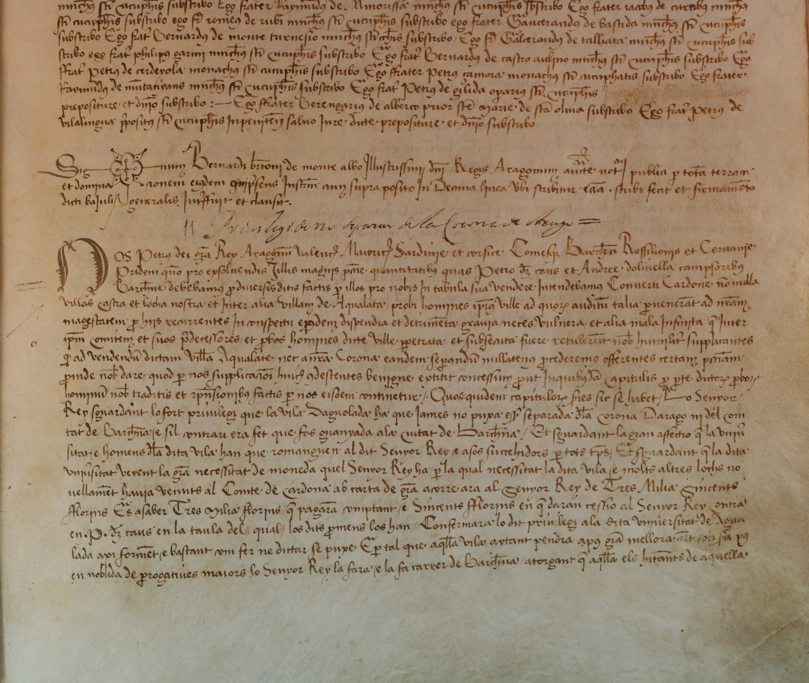 Llibre de Privilegis de la vila d'Igualada, 1234-1589. Llibre relligat amb tapes de fusta recobertes de pell marró amb decoracions geomètrico-florals. Conté la transcripció de 128 privilegis que havia tingut la vila d'Igualada. El primer document és del rei Alfons II de l'any 1291 i el més recent és del 1628. El document trasncrit més vegades és el privilegi de passar a ser carrer de Barcelona, amb els seus drets i deures. Dades tècniques Títol: Llibre de Privilegis de la vila d'Igualada Data: 1234-1589 Suport material: Pergamí Mides: 340 x 260 mm